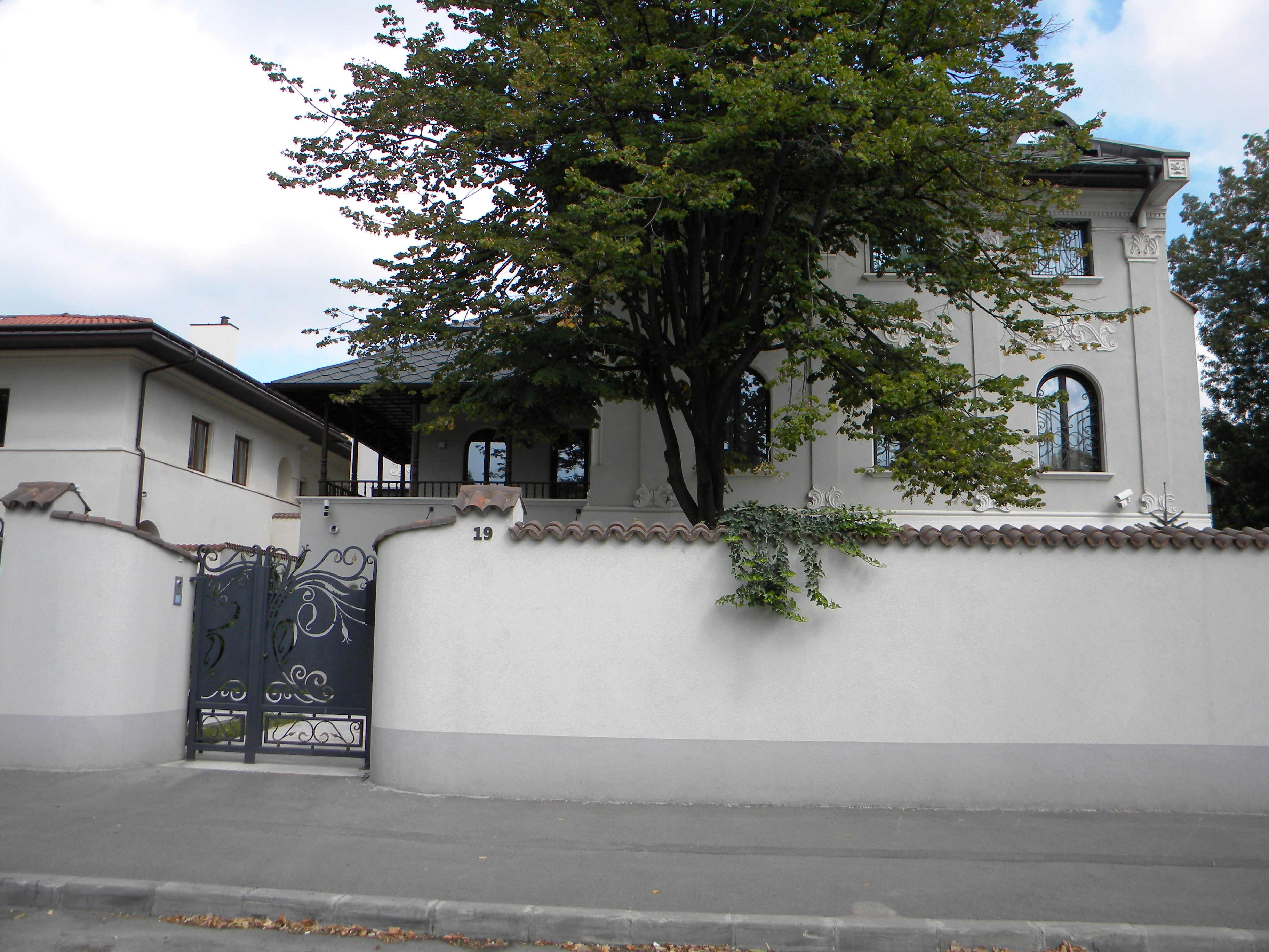 Bucuresti, Romania, Str. Rabat nr. 19, sect. 1, (Vila); B-II-m-B-19495